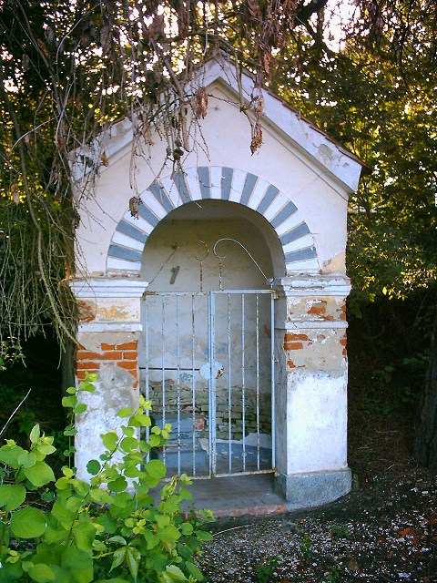 Wegkapelle in Affing